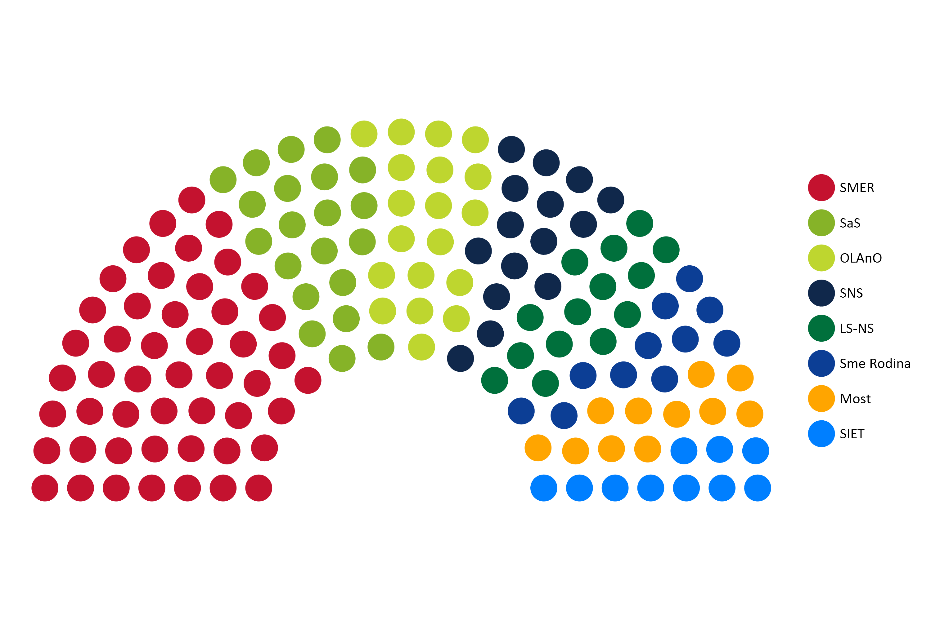 Rozdelenie mandátov pre jednotlivé politické strany.